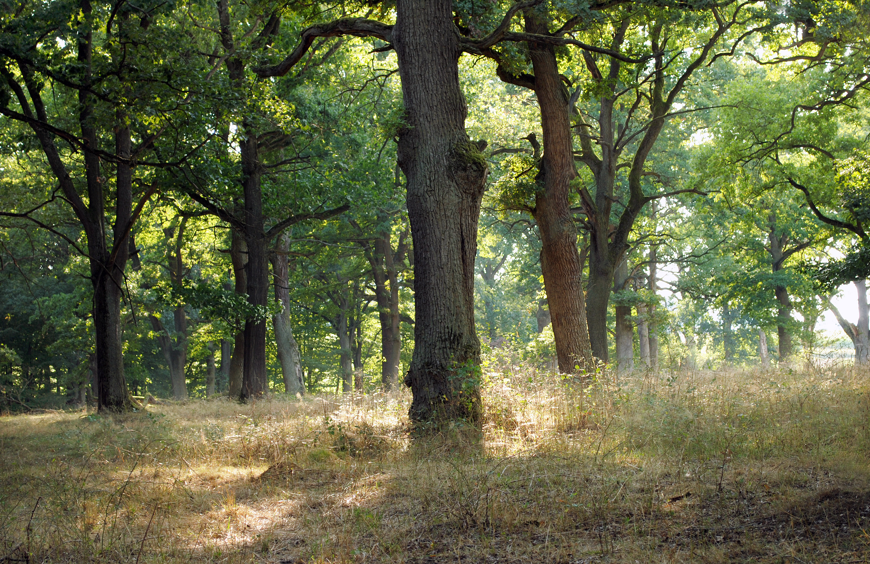 Der Fennat Anger bei Krönhof (Gemeinde Engelthal) ist zu jeder Jahreszeit ein besonderes Naturerlebnis.